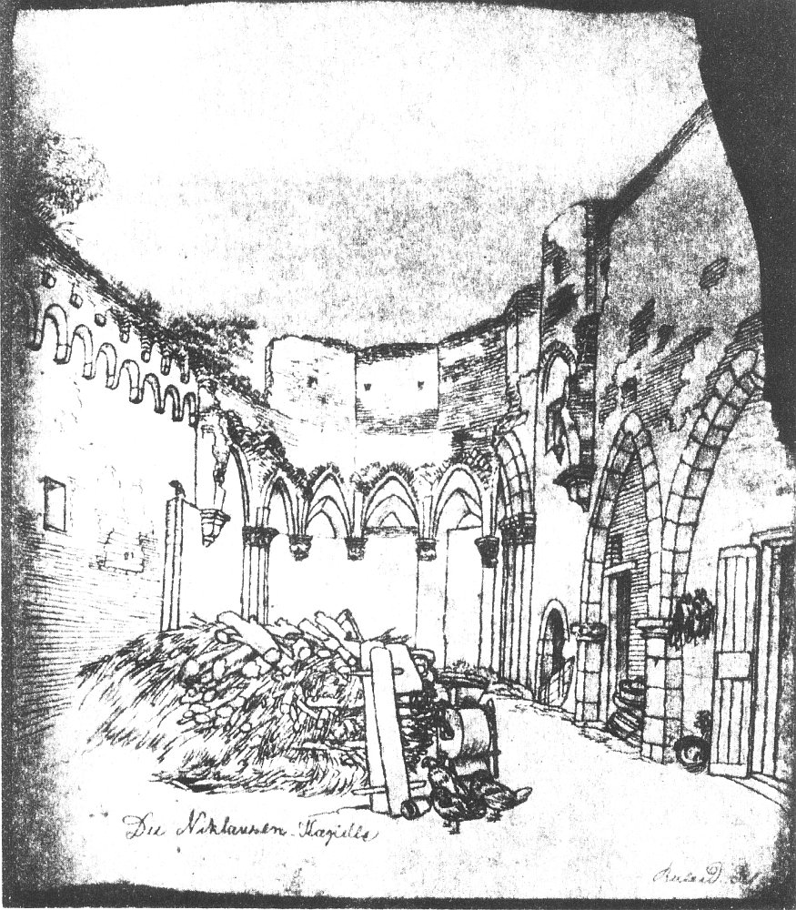 Speyer, Nikolauskapelle um 1810